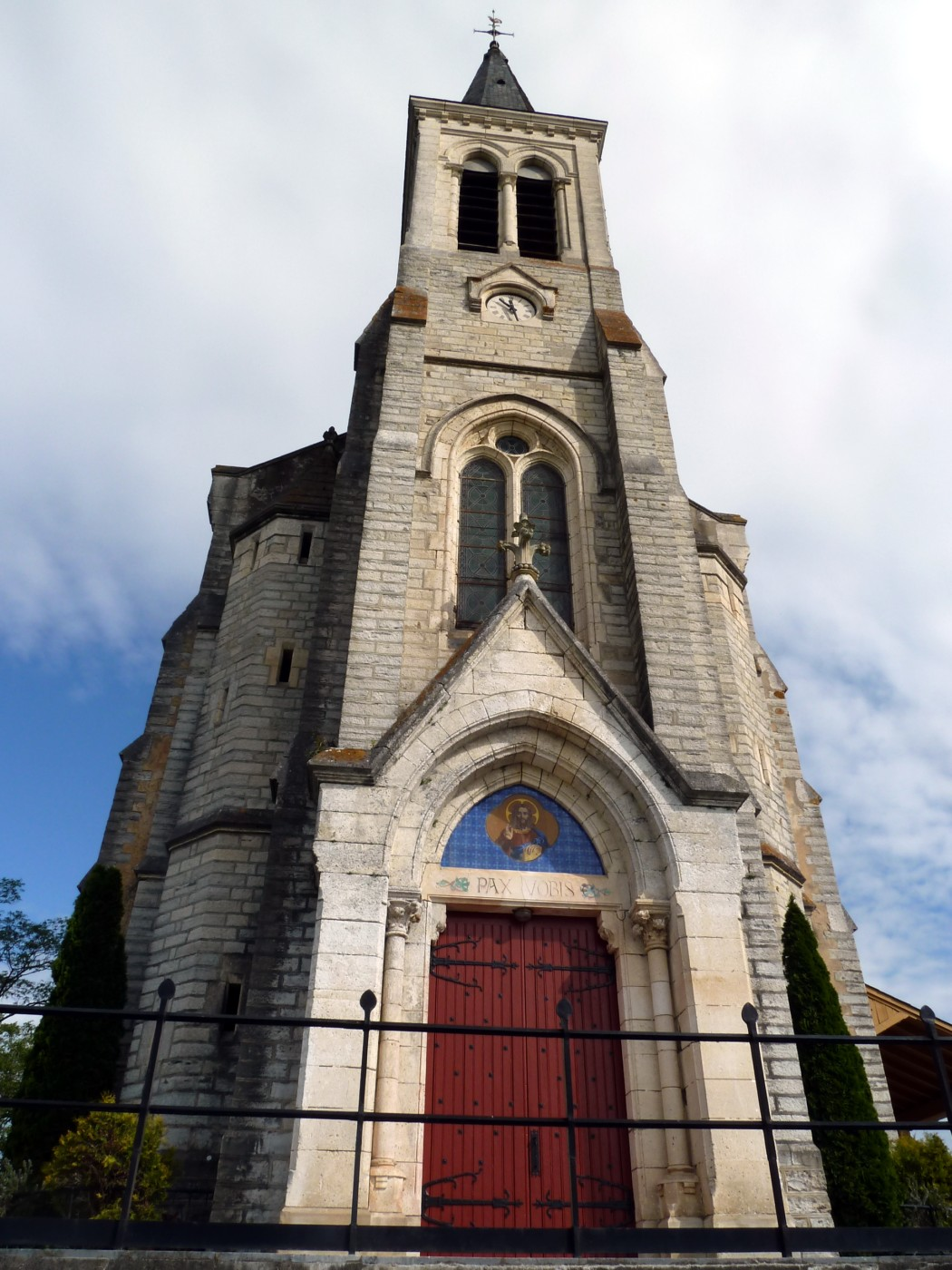 Église de Saint-Barthélemy (Landes)